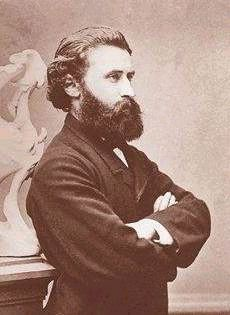 Pieter Kluitman, oprichter van uitgeverij Kluitman